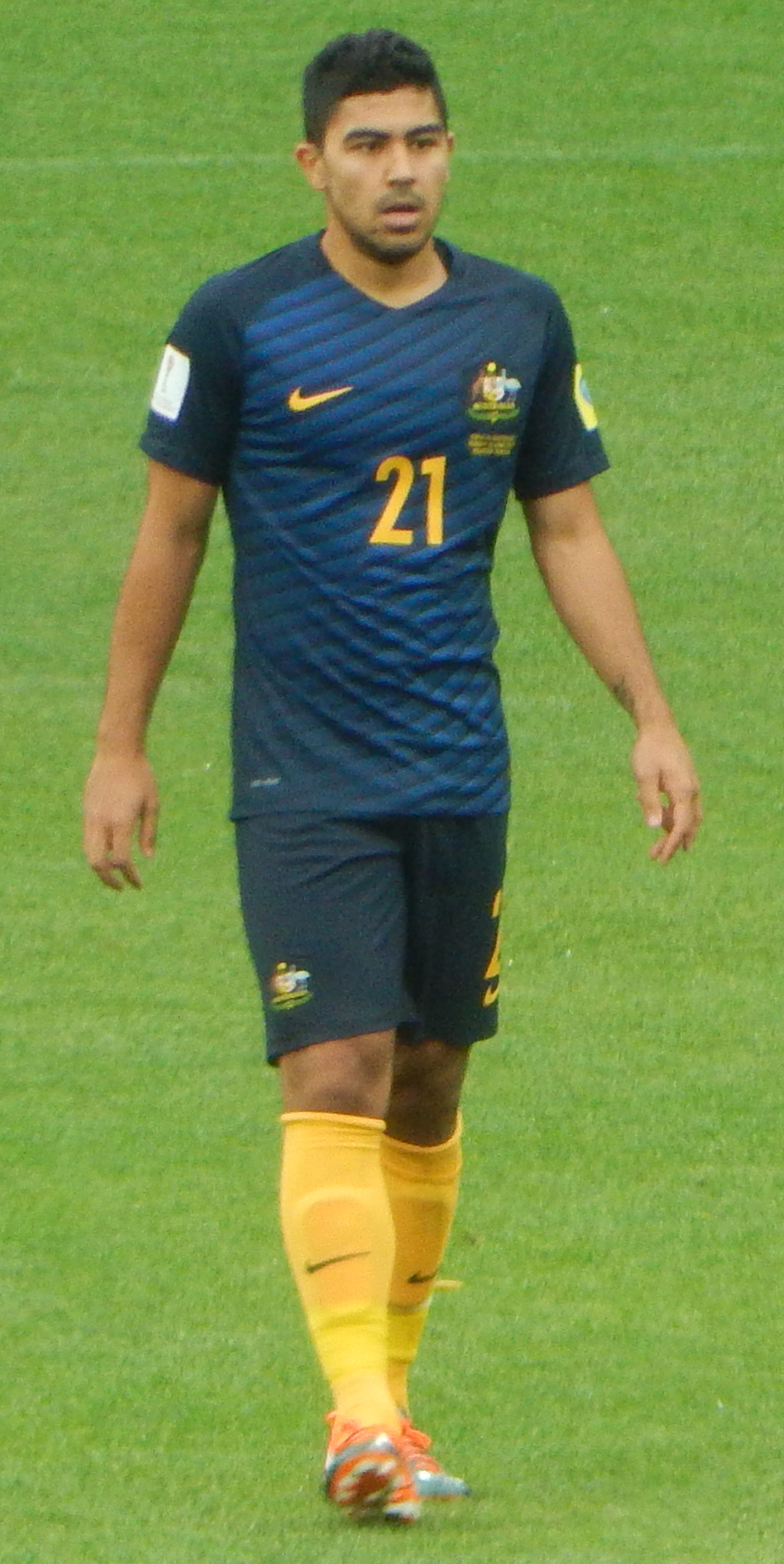 Массимо Луонго Матч Чили – Австралия